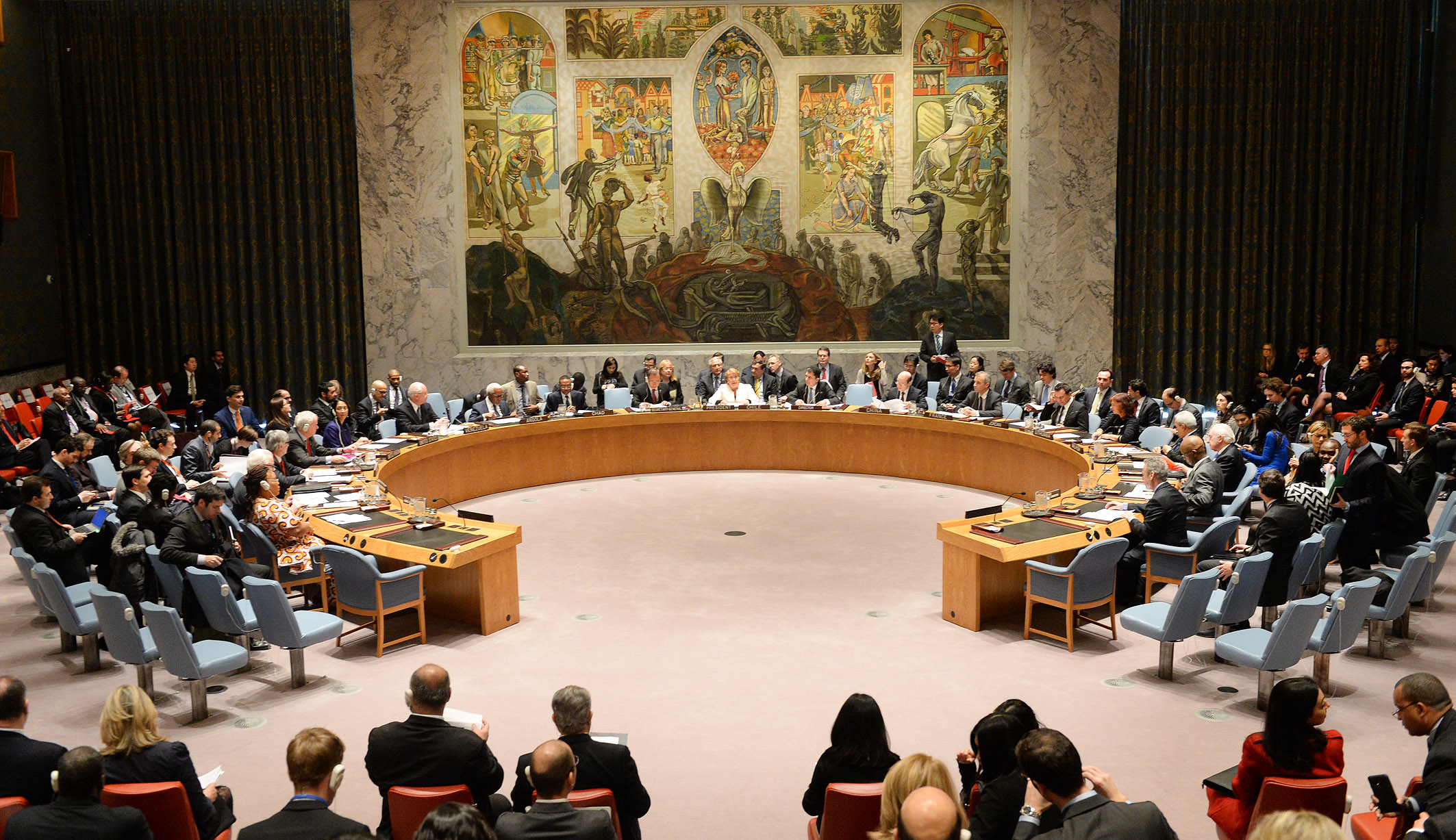 Gobierno de Chile: Bachelet en Consejo de Seguridad de la ONU (2015)